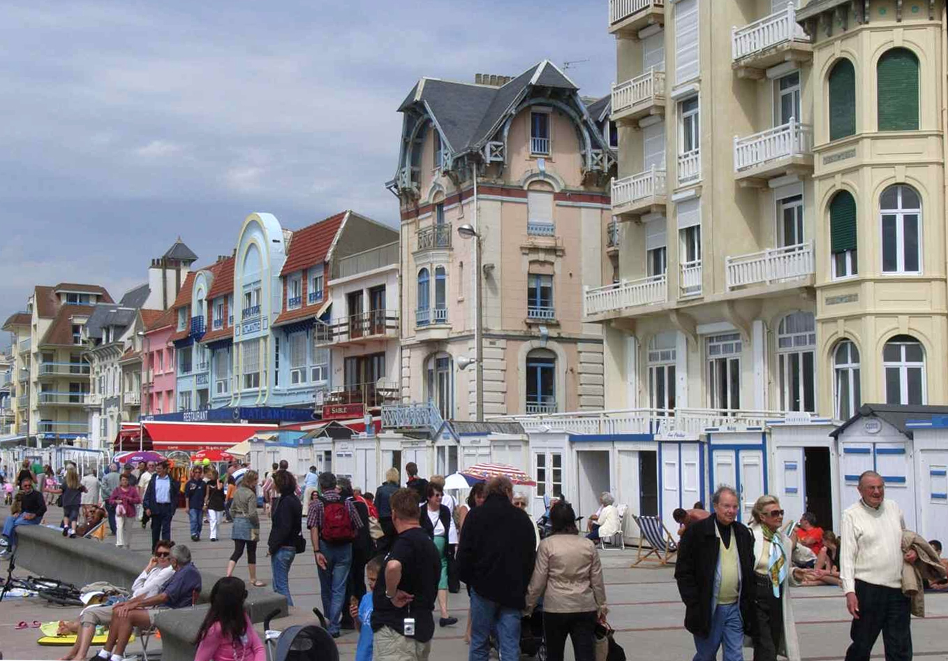 Uferprommenade Wimmereux